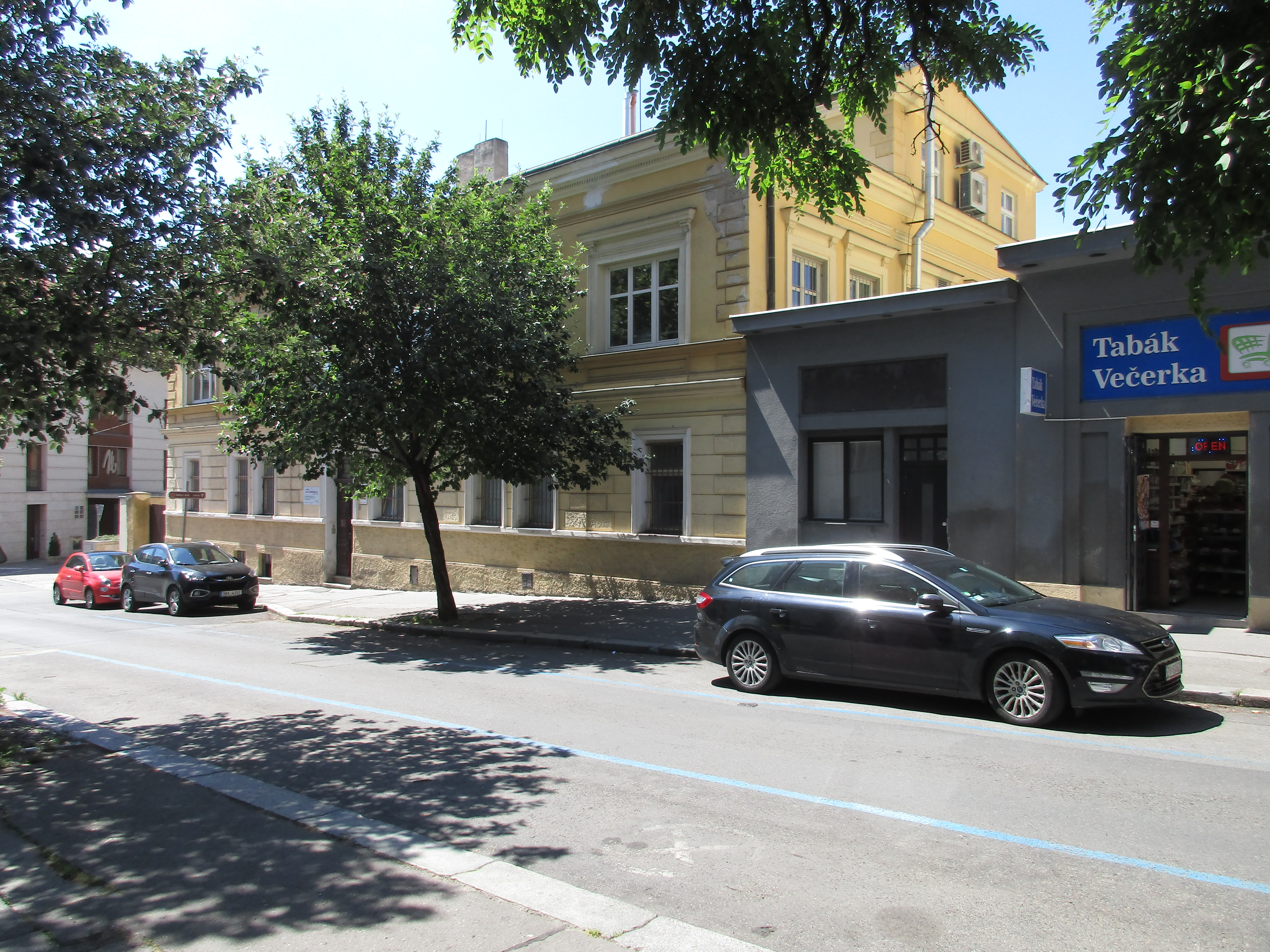 Výroba optických přístrojů Josef a Jan Frič. Americká 233/3, Praha 2.